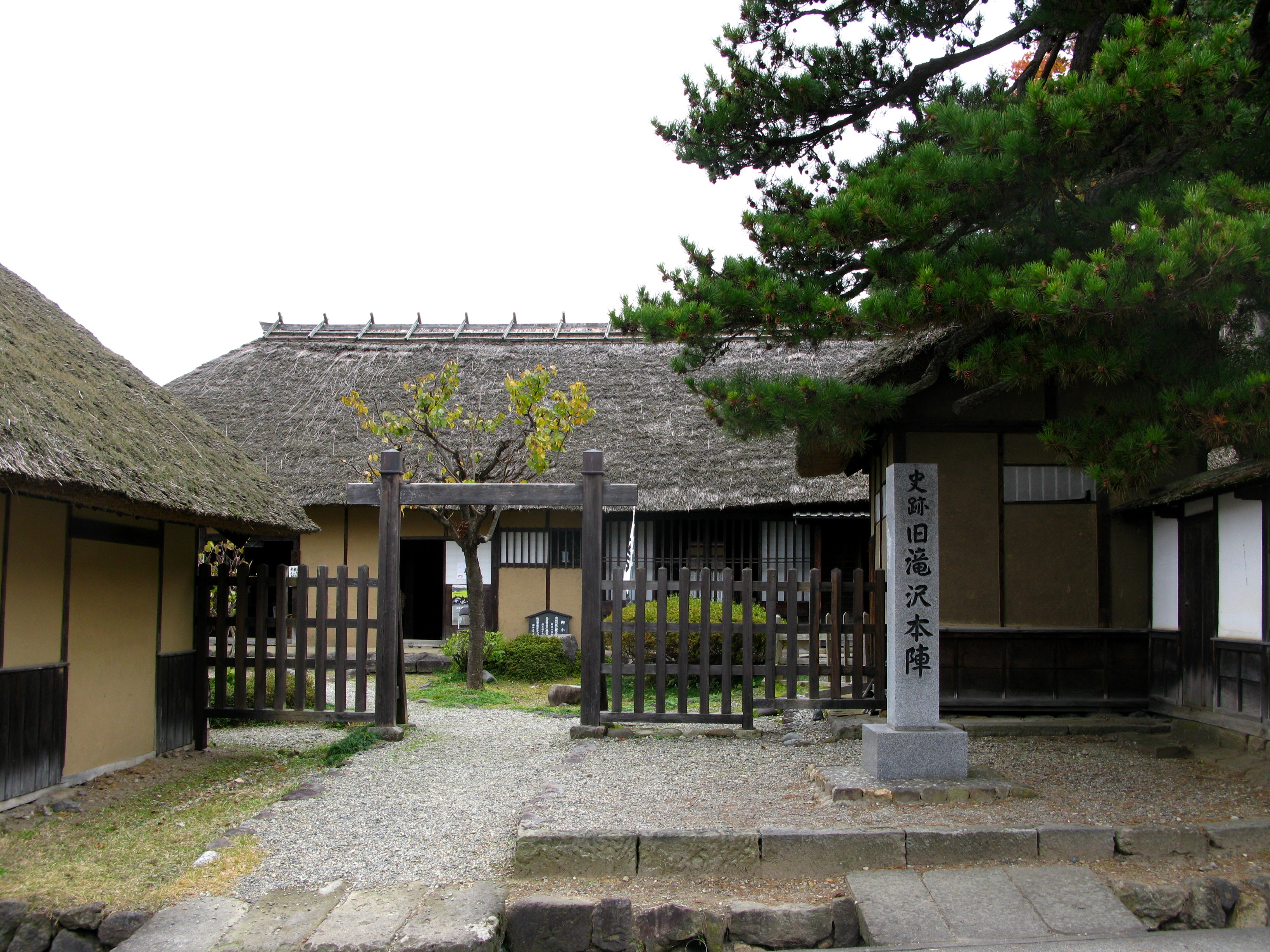 旧滝沢本陣（史跡）、旧滝沢本陣横山家住宅（重要文化財） Former Takizawa Honjin, Aizuwakamatsu, Fukushima, Japan